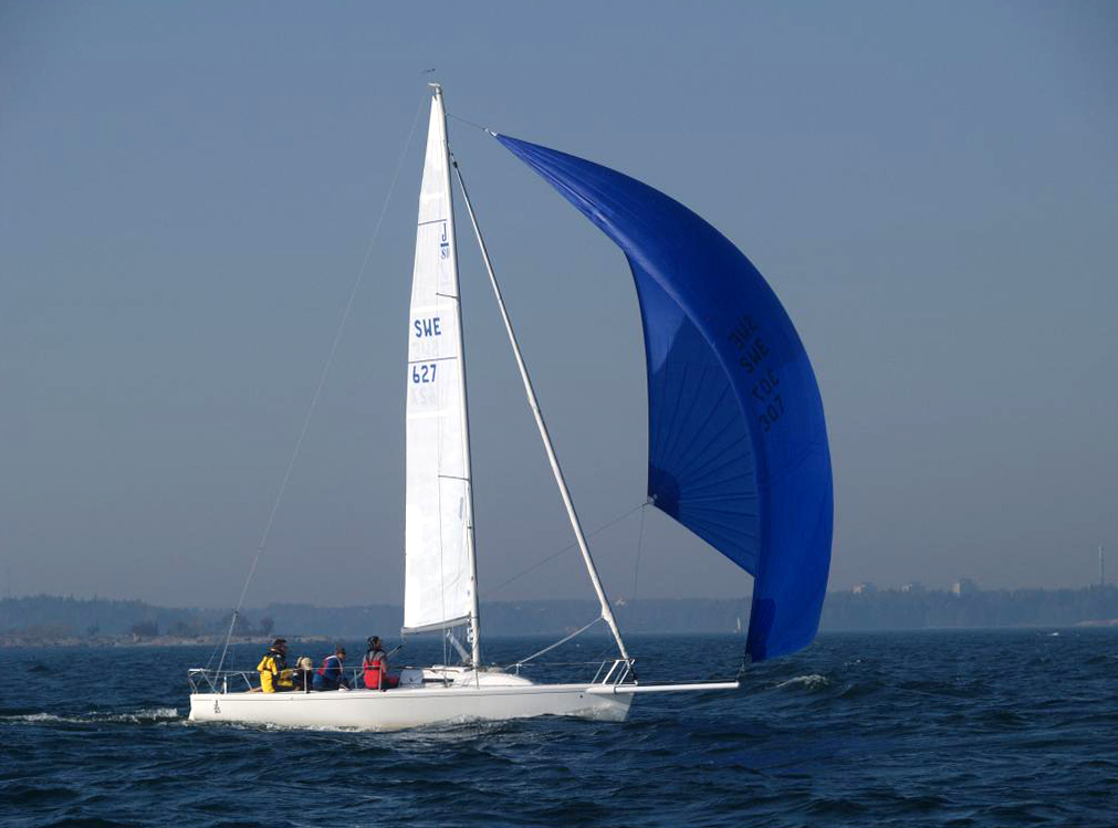 J80, purjehduskilpailu, Suomen Urheiluveneliitto, Helsinki